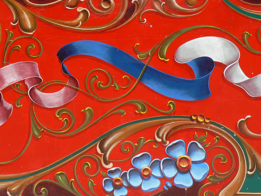 Arte del Fileteado en Buenos Aires